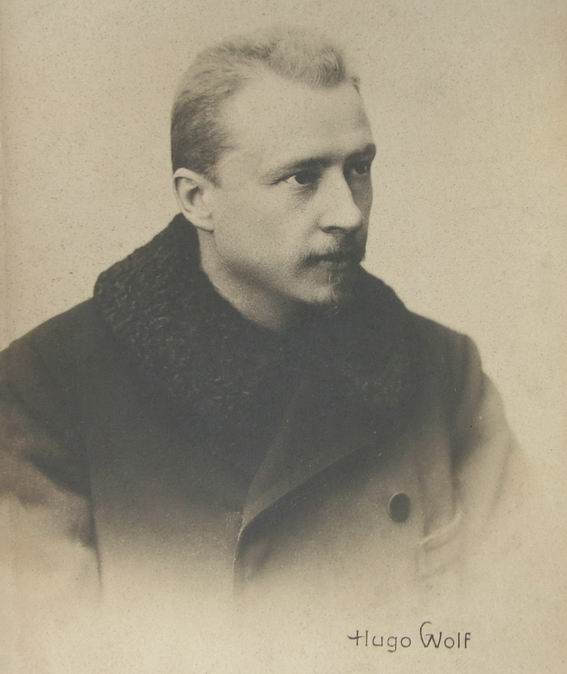 австрийский композитор Хуго Вольф